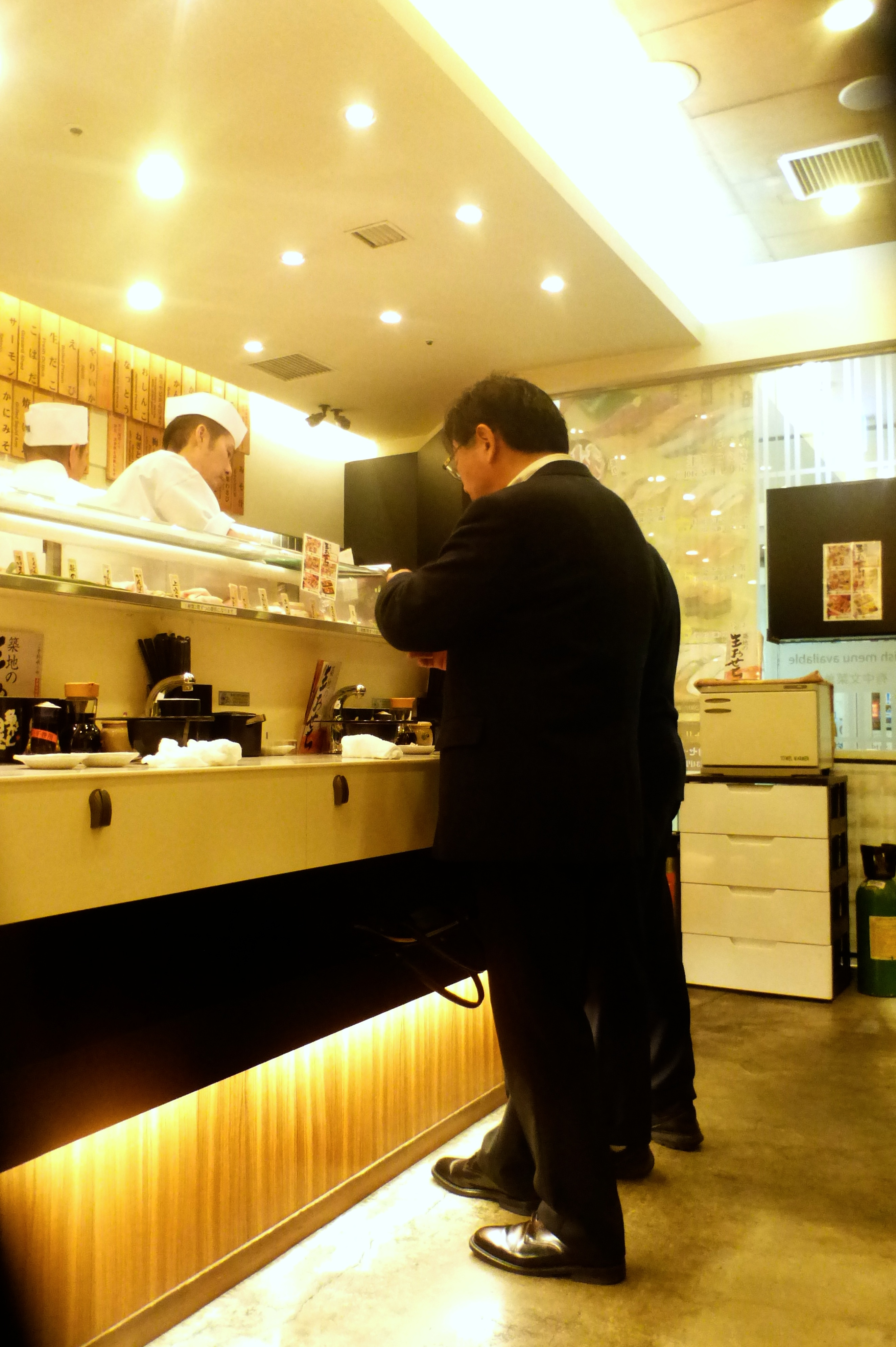 立ち食い寿司の店の中 (Inside a "standing sushi" restaurant)